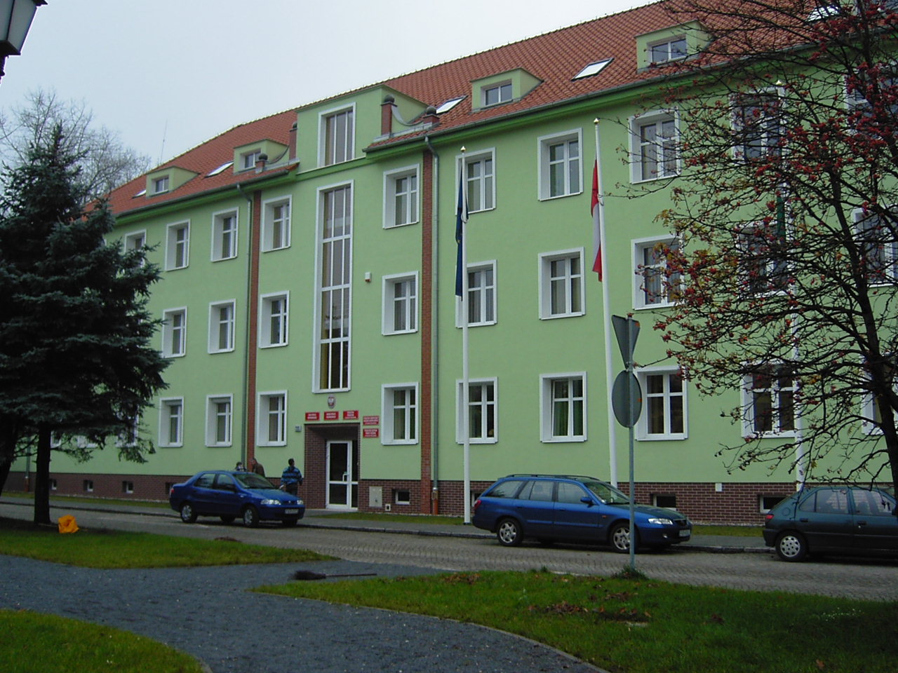 Dawny sztab 11 pz z Krosna Odrzańskiego. zdjęcie późniejsze